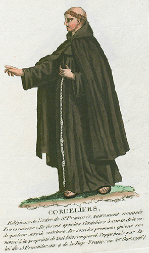 Collection de costumes de tous les ordres monastiques, supprimés à differentes époques, dans la ci-devant Belgique, Bruxelles, Philippe Joseph Maillart et sœur, 1811